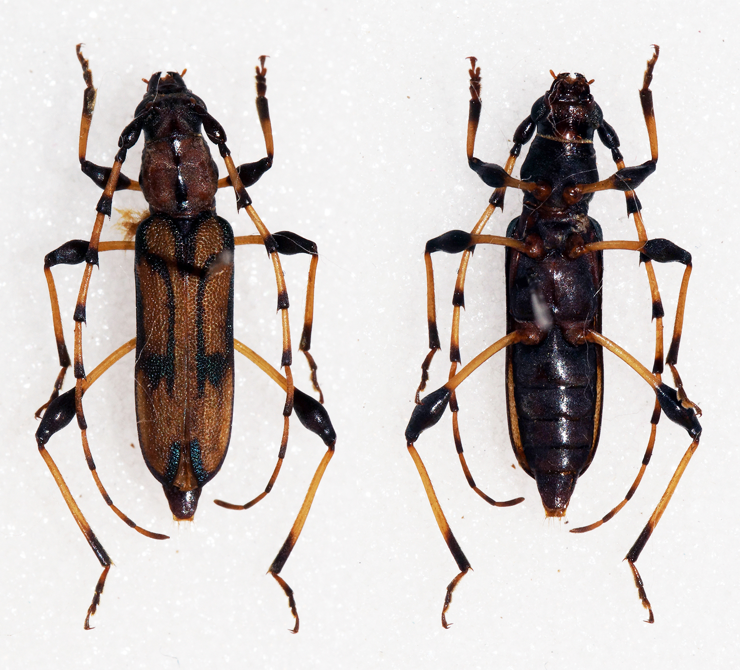 Fåhraeus,1872 Sex: Male Data: 09-12-10 - Cuacua 36m - 8km East Caia - Zambezi River - Mozambique Size: 12.5mm